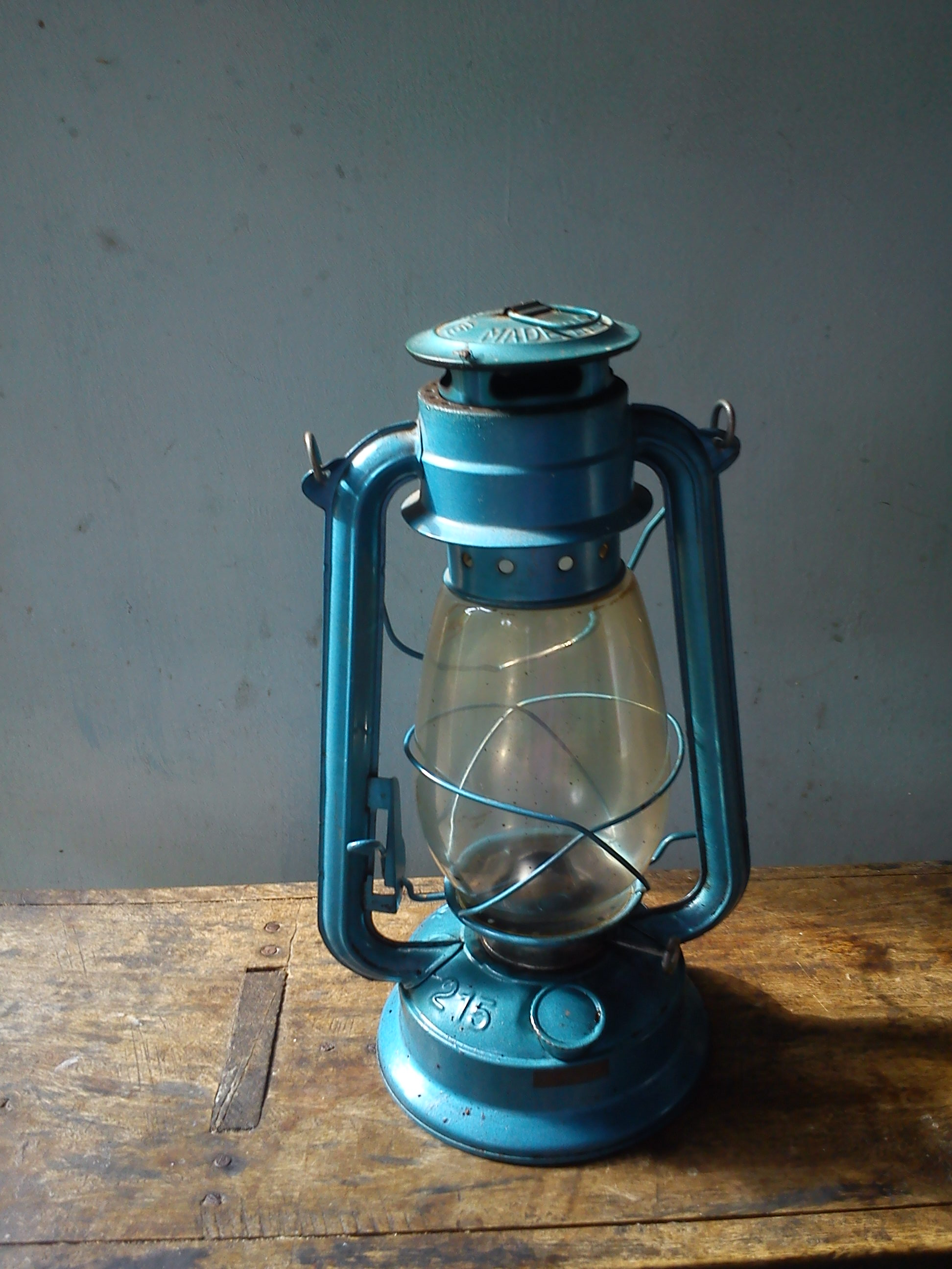 மண்ணெண்ணெய் விளக்கு